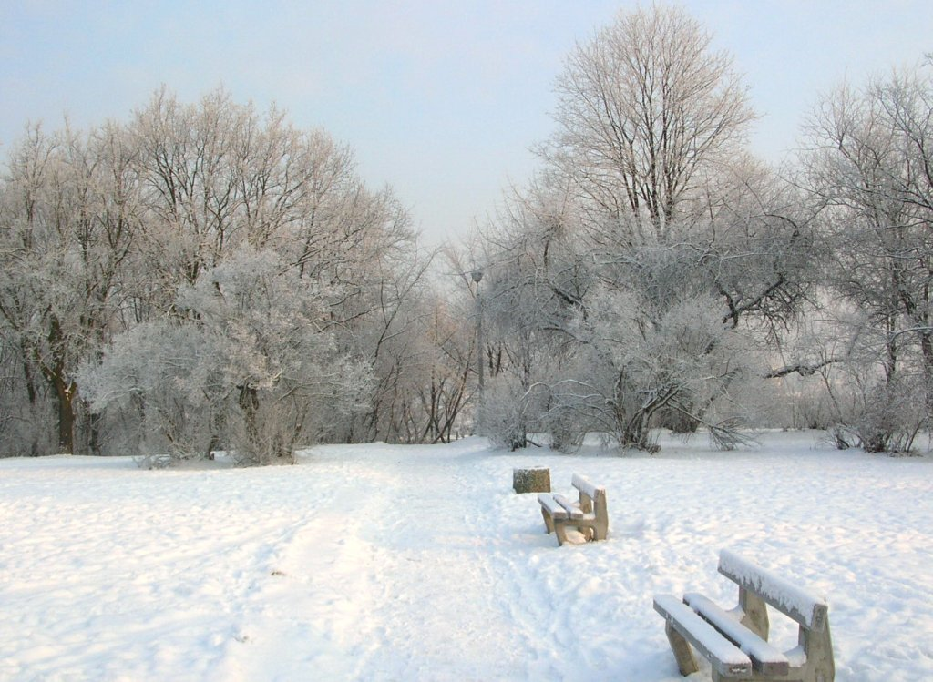 Park Wzgórze Wolności w Bydgoszczy